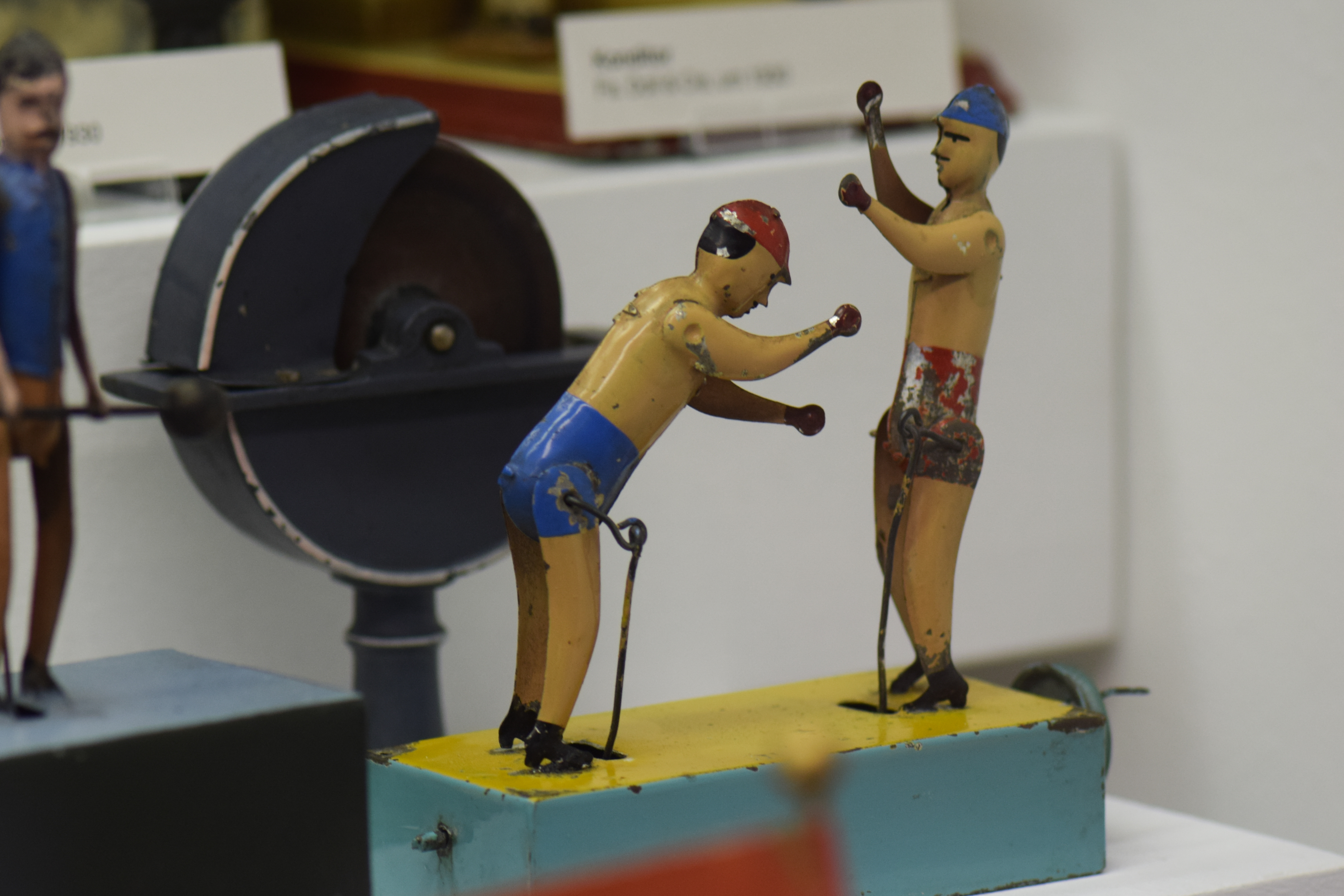 Munich 2014